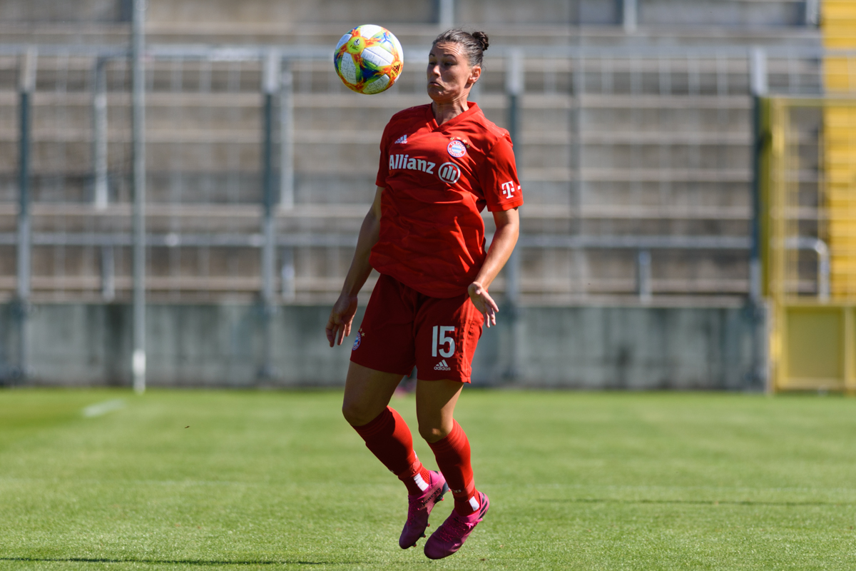 Emily Gielnik during FC Bayern (women) vs Bayer Leverkusen (women), September 2019